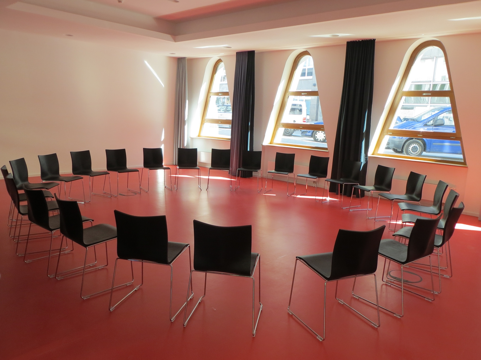 Stuhlkreis